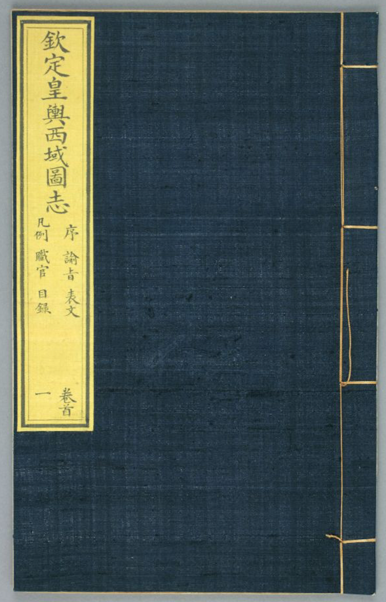 中文（中国大陆）: 清傅恒等纂的钦定皇舆西域图志，清乾隆四十七年（公元1782年）武英殿刻本